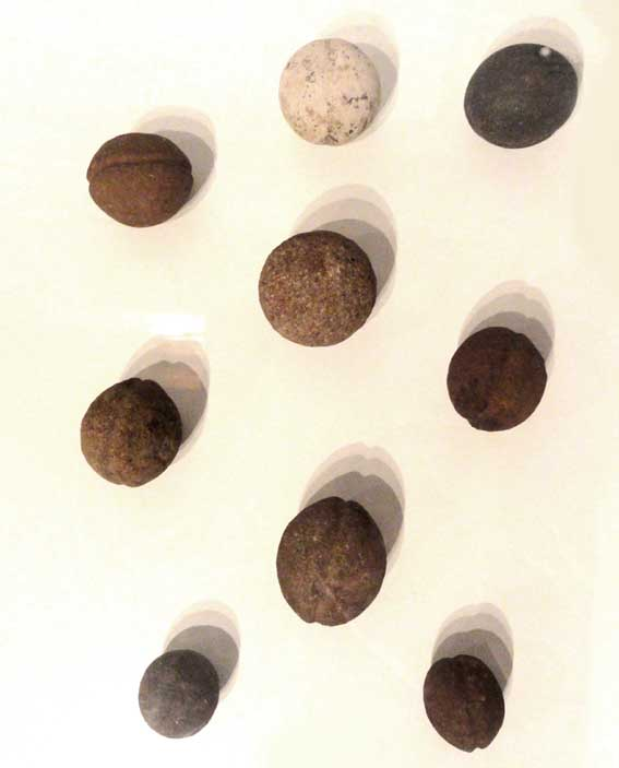 Indústria lítica tradição Umbu-Vieira. Pesos de boleadeira.